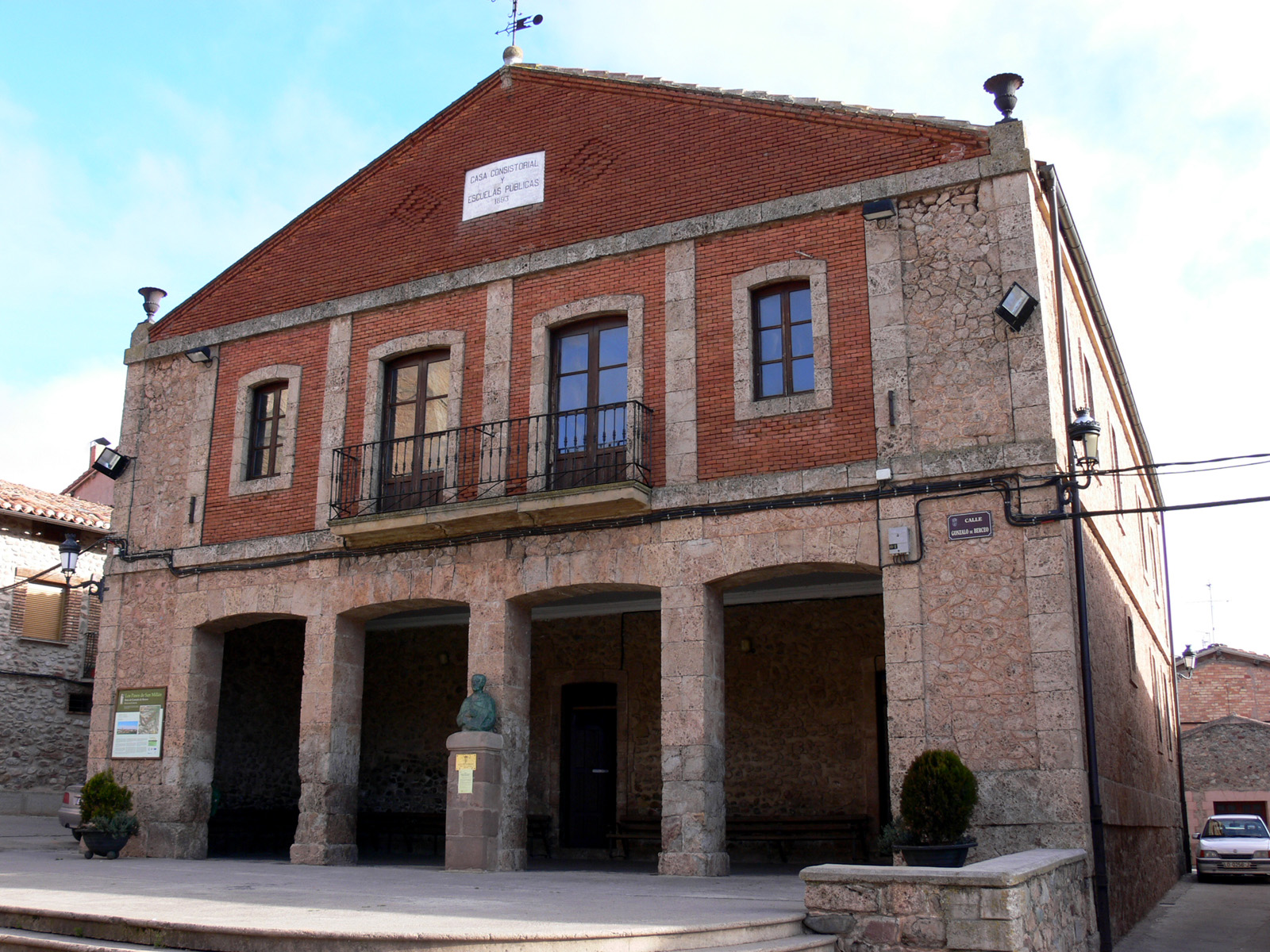 Ayuntamiento de Berceo - La Rioja (España).